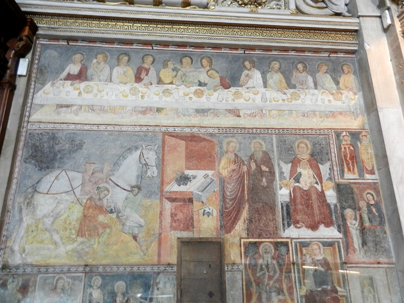 Bergamo - Affreschi del secolo XIV raffiguranti l'Ultima cena e Storie di S. Eligio nella Basilica di S. Maria Maggiore